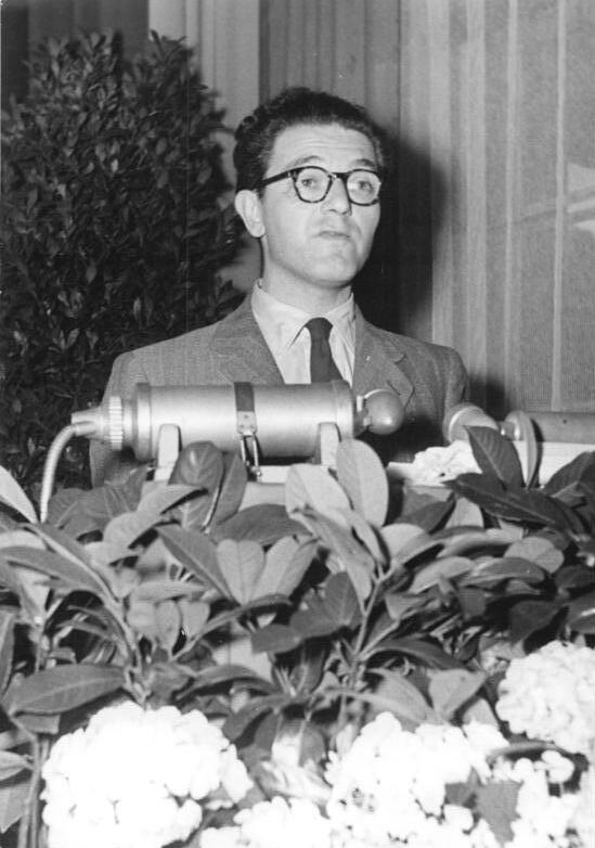 Zentralbild-Köhler 19.6.52 Protestkundgebung für André Stil. Am Donnerstag, dem 19. Juni 1952, um 19 Uhr veranstaltete der Deutsche Schriftstellerverband im Klubhaus der Kulturschaffenden, Berlin W8, Jägerstrasse 2, eine Kundgebung für den eingekerkerten französischen Schriftsteller, Stalinfriedenspreisträger Andre' Stil. UBz: Henryk Keisch während seiner Ansprache.